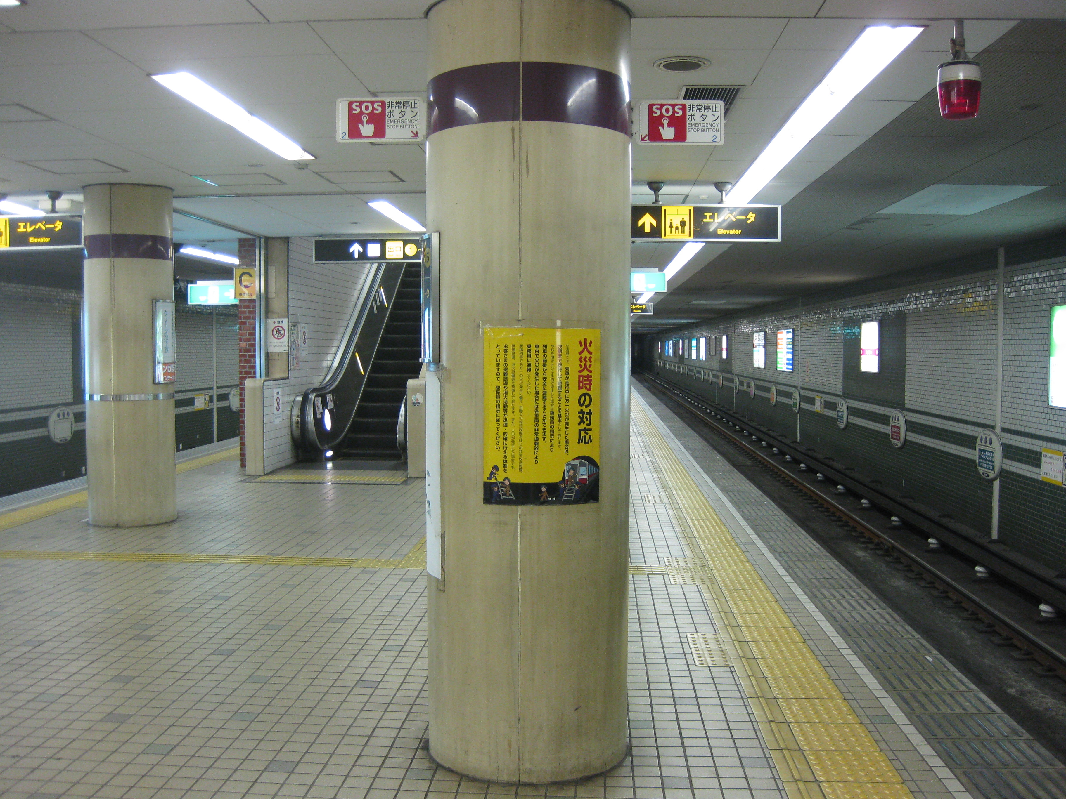 大阪市営地下鉄谷町線都島駅プラットホーム